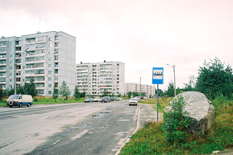 Kalevala str.